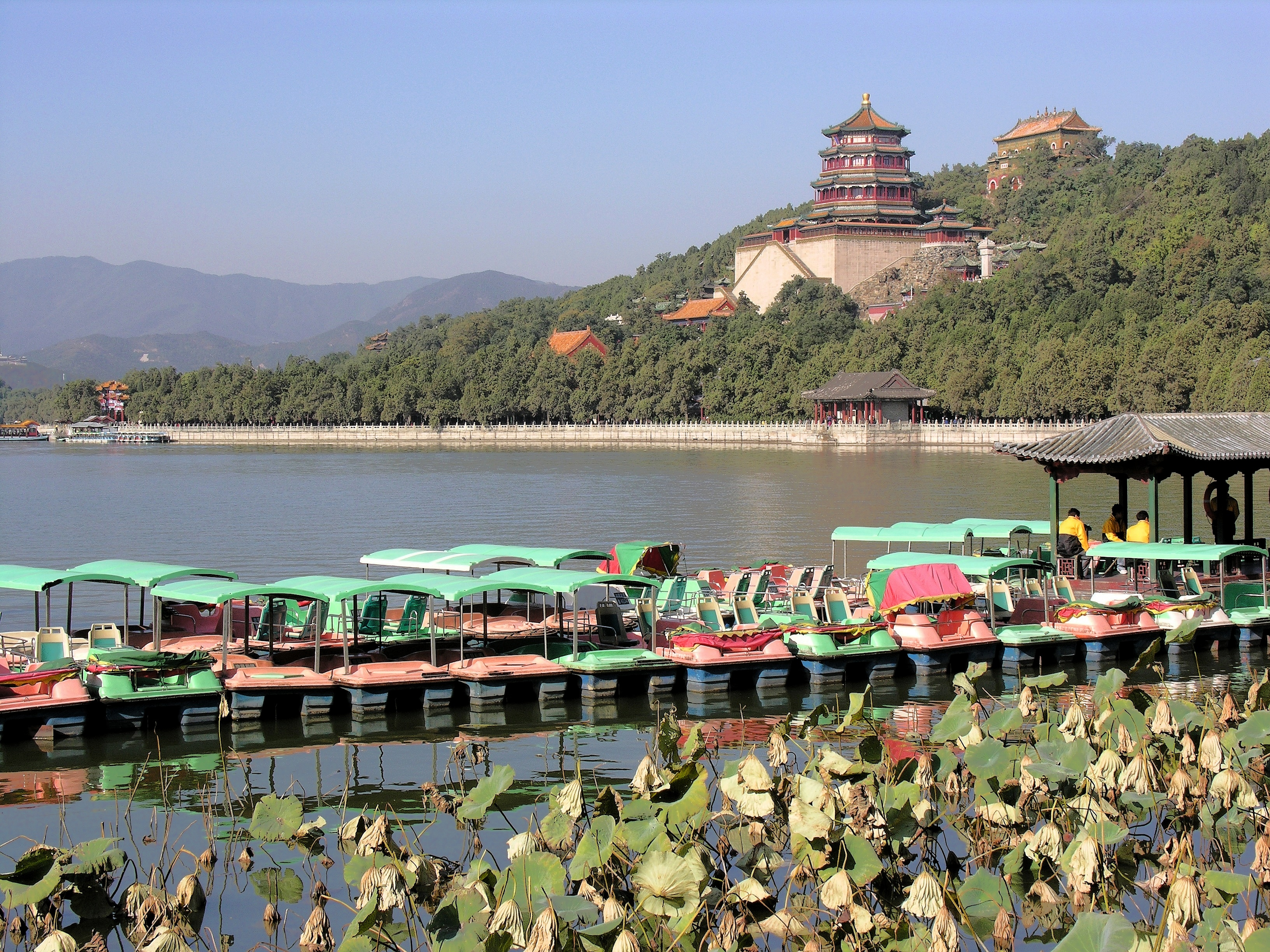 Sommerpalast, Peking